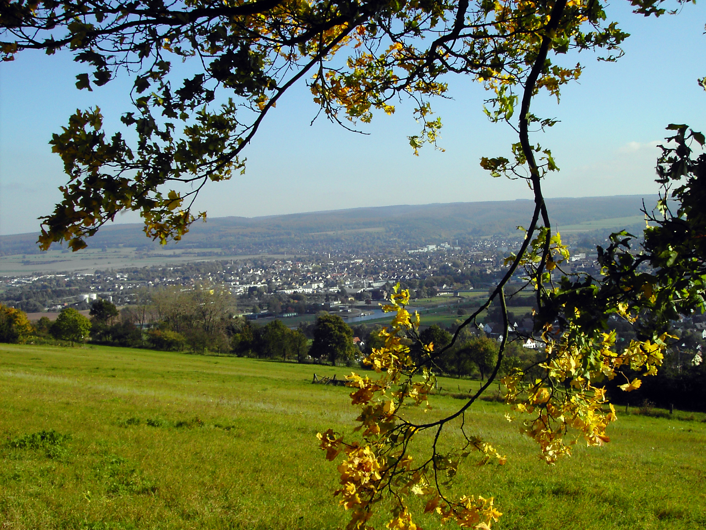 Holzminden im Herbst 2005 - Blick vom Stahler Berg auf HOL